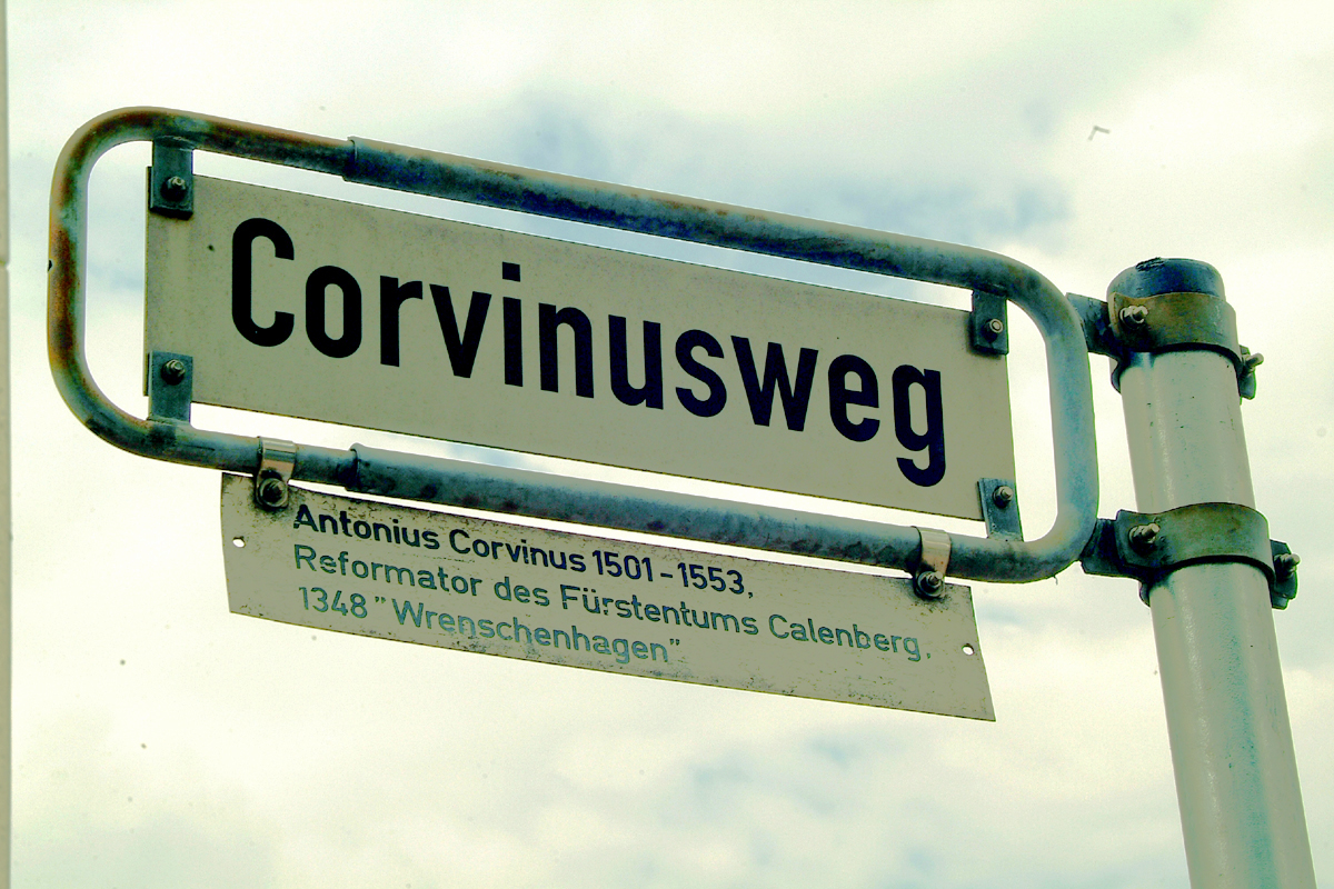 Sie haben ein besseres Bild? Sogar ein historisches Dokument als Bild(ungsförderung)? Zeigen Sie' s uns. Stiften Sie es Ihren Kindern, unseren Enkeln, allen Menschen. Hier.